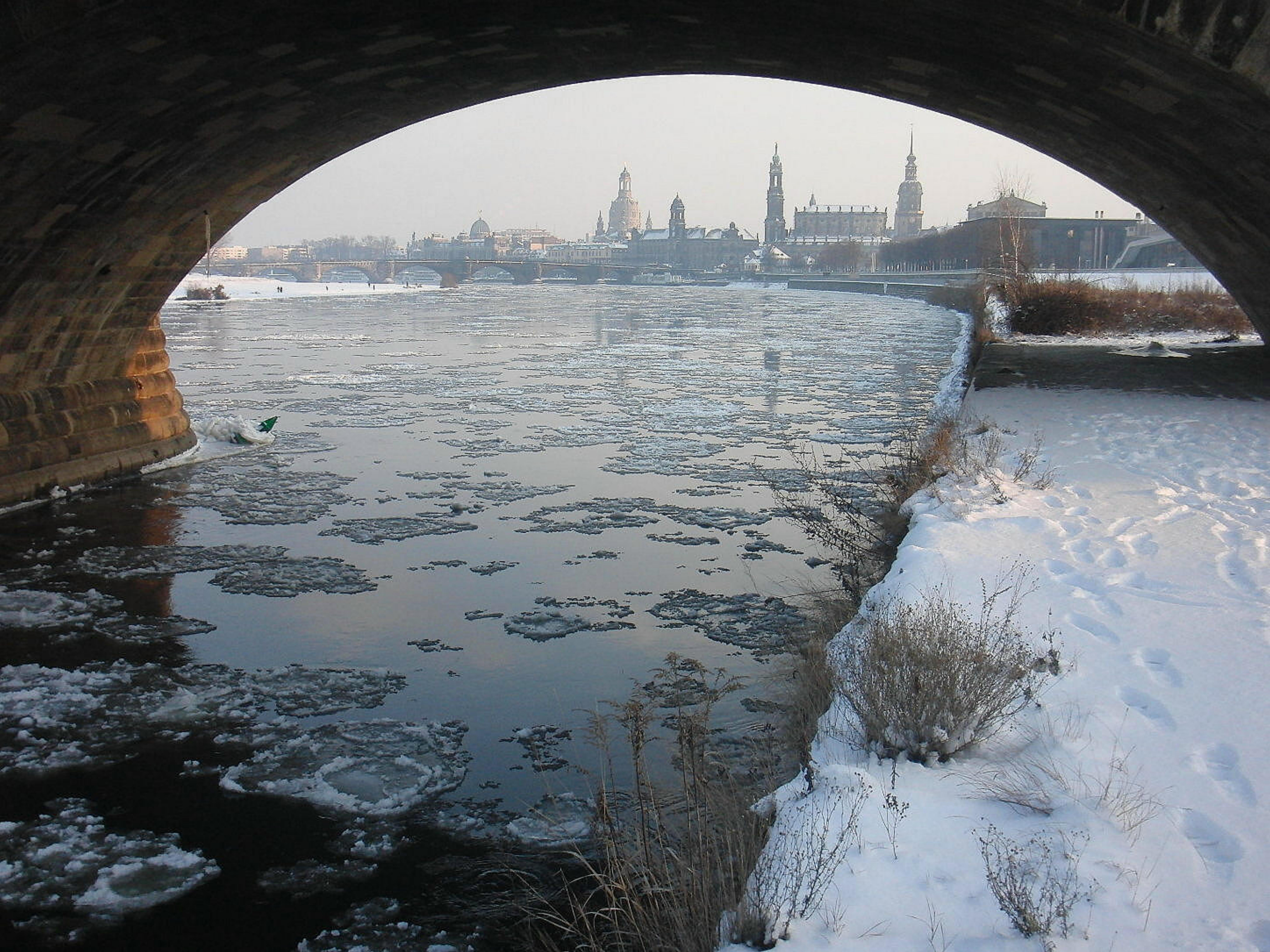 Dresden im Winter, Blick unter der Marienbrücke zur Stadt